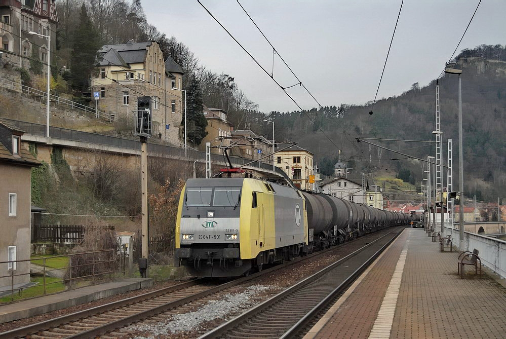 ITL ES64F - 901 (152 901-5) in Königstein